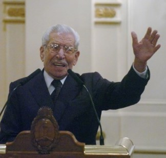 Manuel Quindimil (1923-2008), ex intendente del Partido de Lanús, Zona Sur del Gran Buenos Aires, Argentina. Fotografía tomada en el Salón Blanco de la Casa de Gobierno de Argentina.